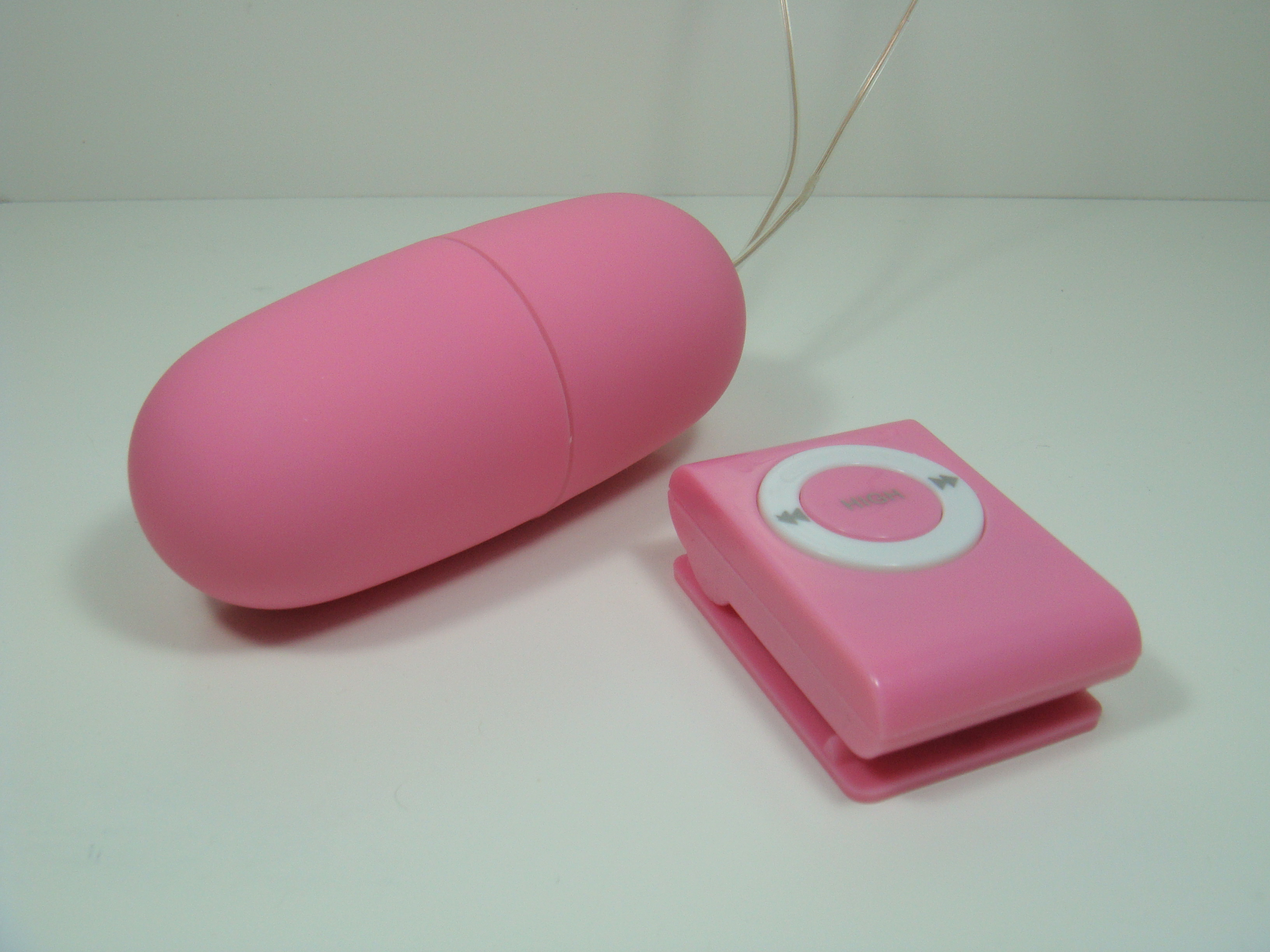 一個粉紅色的跳蛋